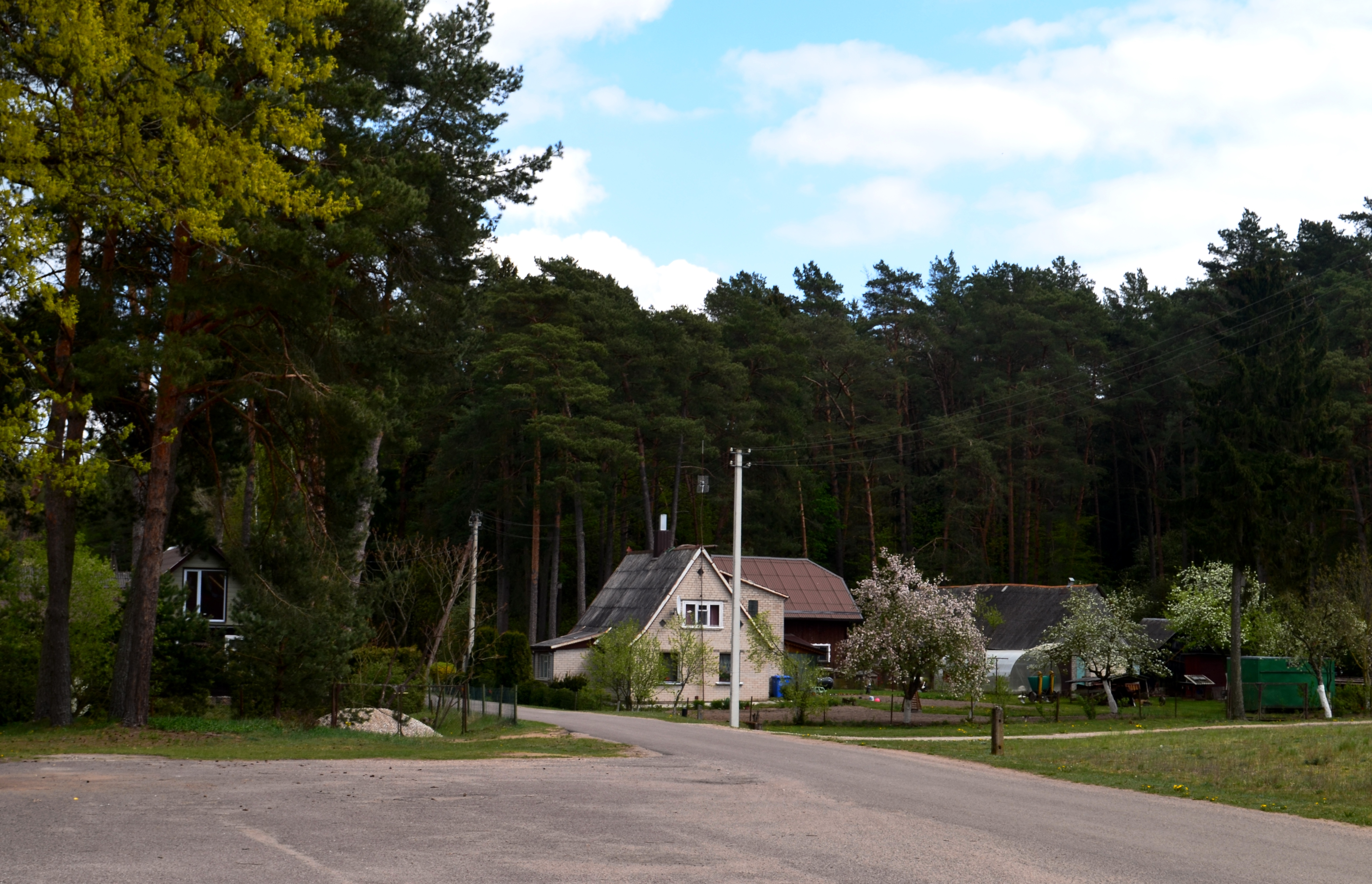 Paežerėliai, Šakių raj.